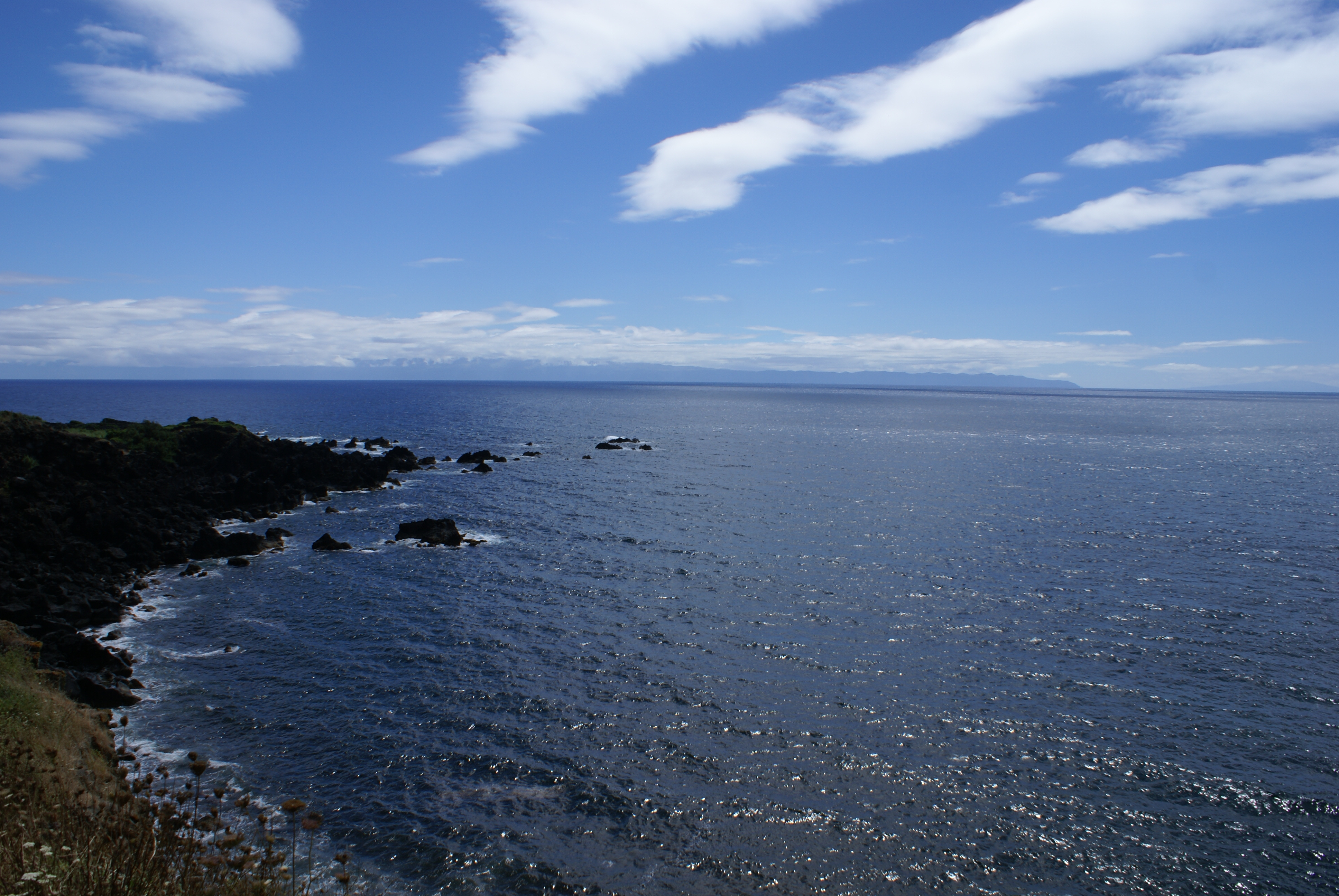 Fajã da Beira Mar, Santa Cruz da Graciosa, ilha Graciosa, Açores, Portugal